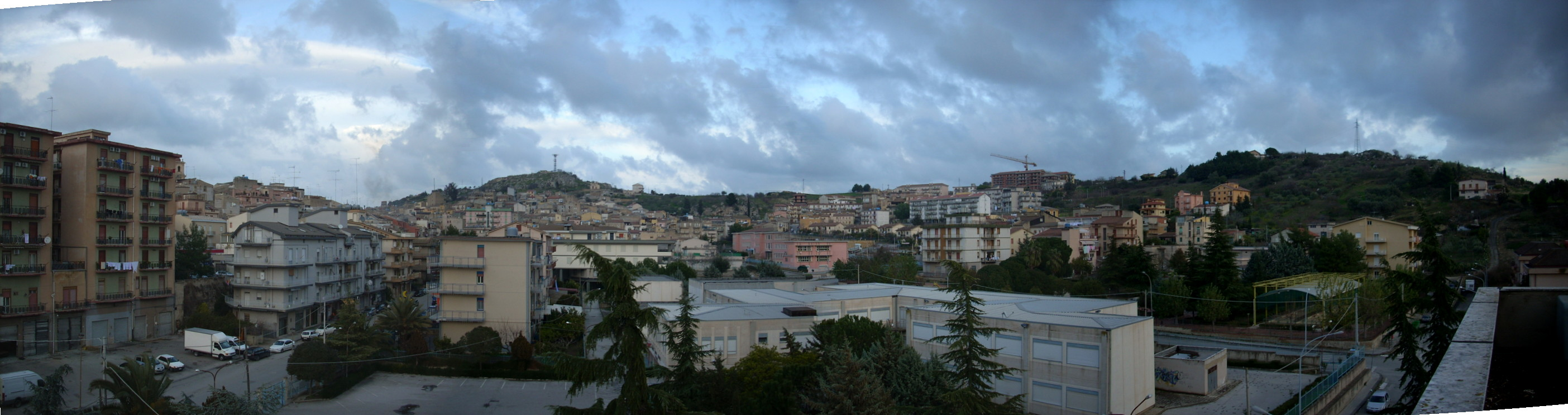 panorama serradifalco